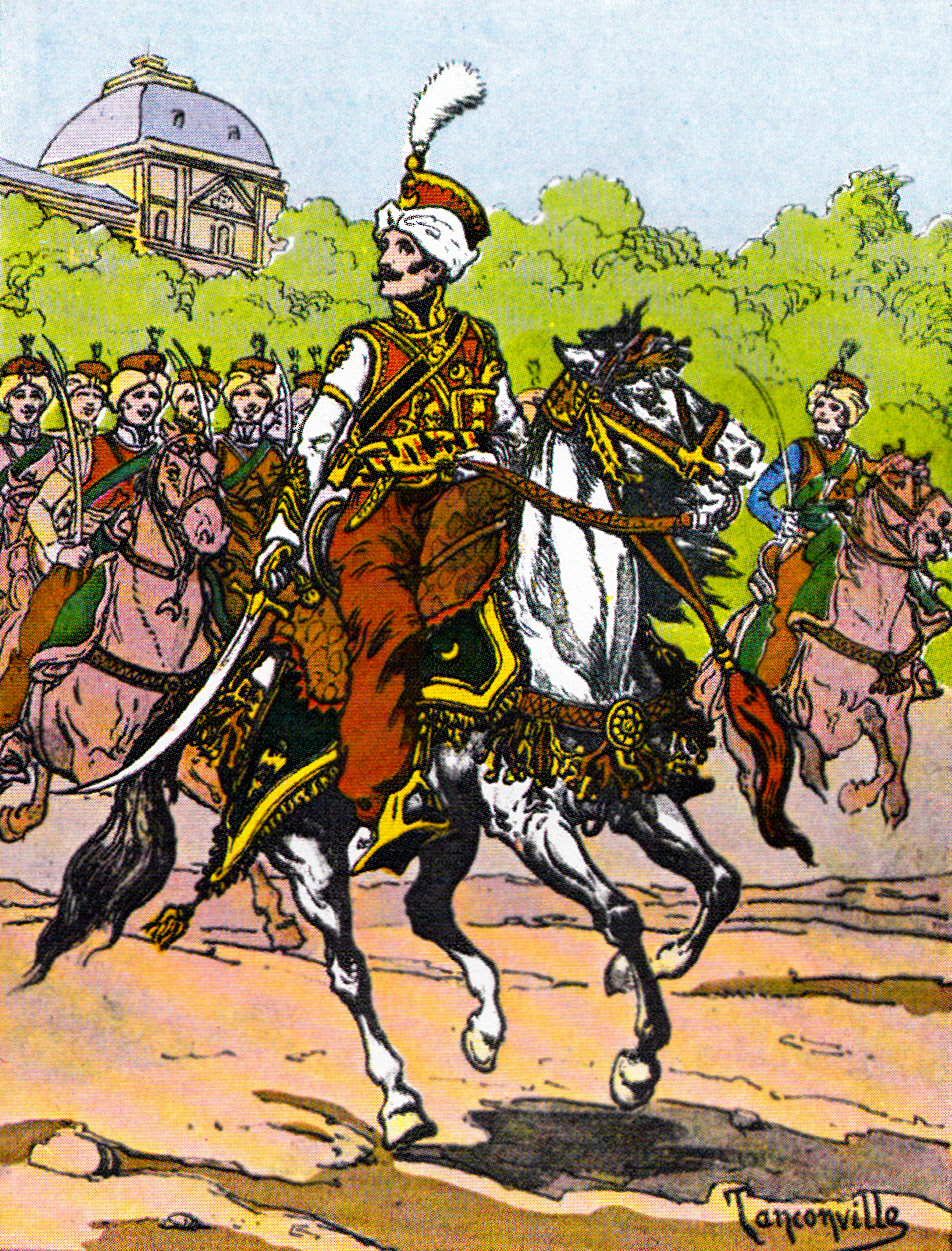 François-Antoine Kirmann, chef d'escadron des mamelouks de la Garde impériale (1808-1811).